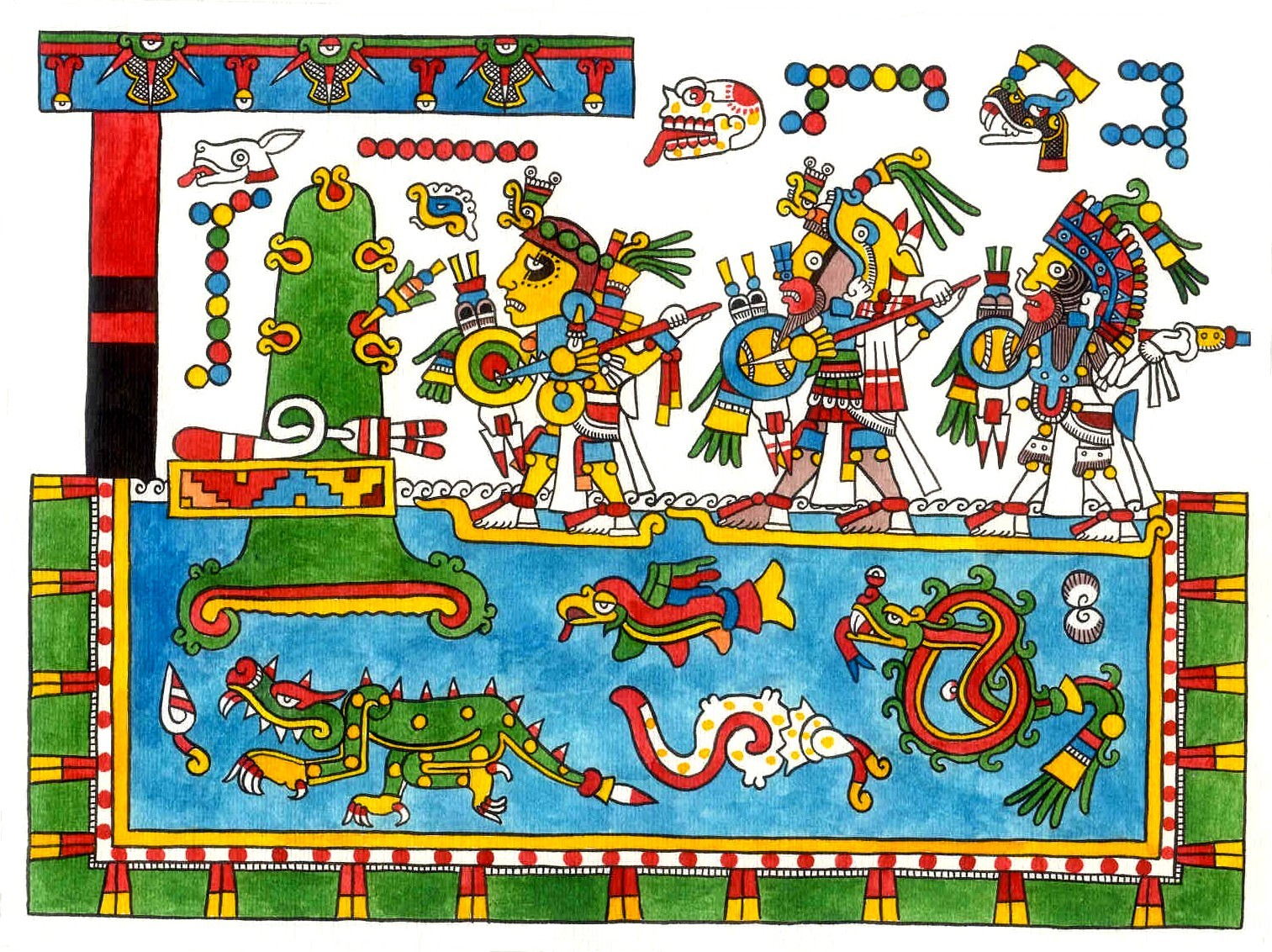 lámina del Códice Nuttall, dibujado por Lacambalam